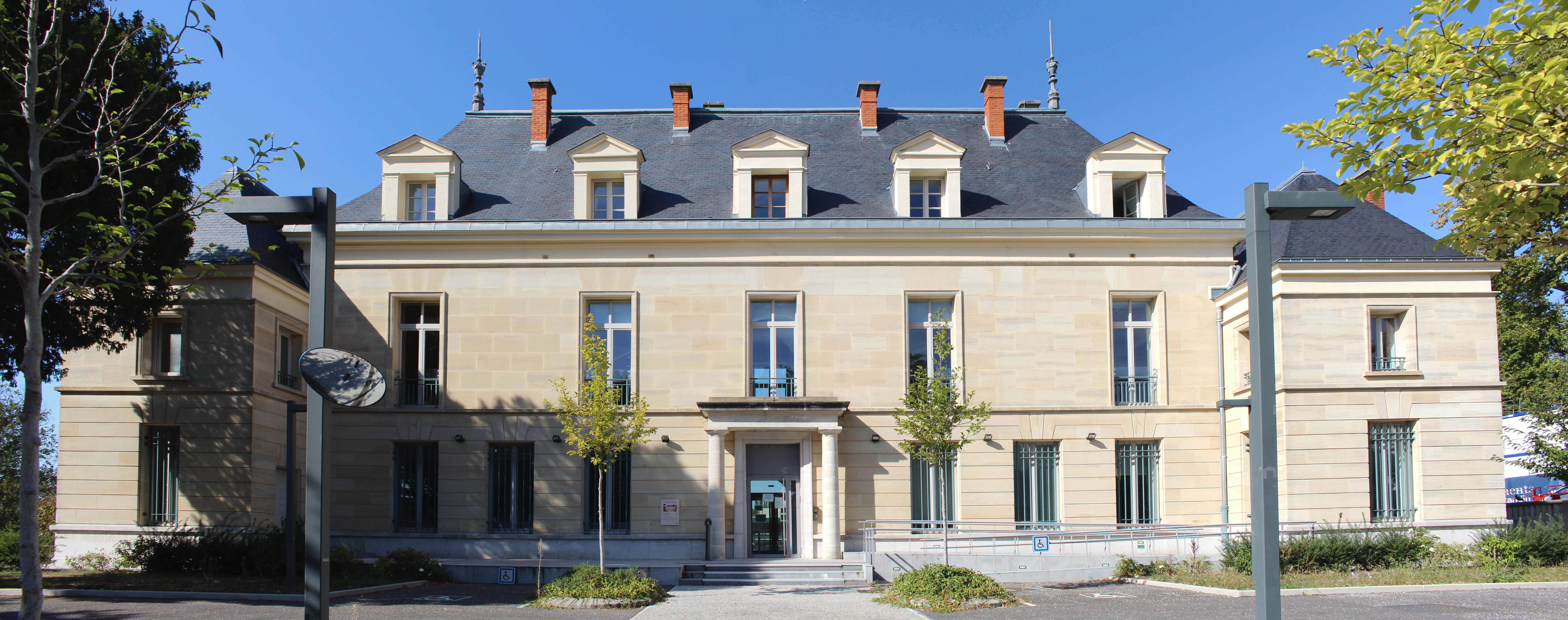 Château Montaleau, Sucy-en-Brie.